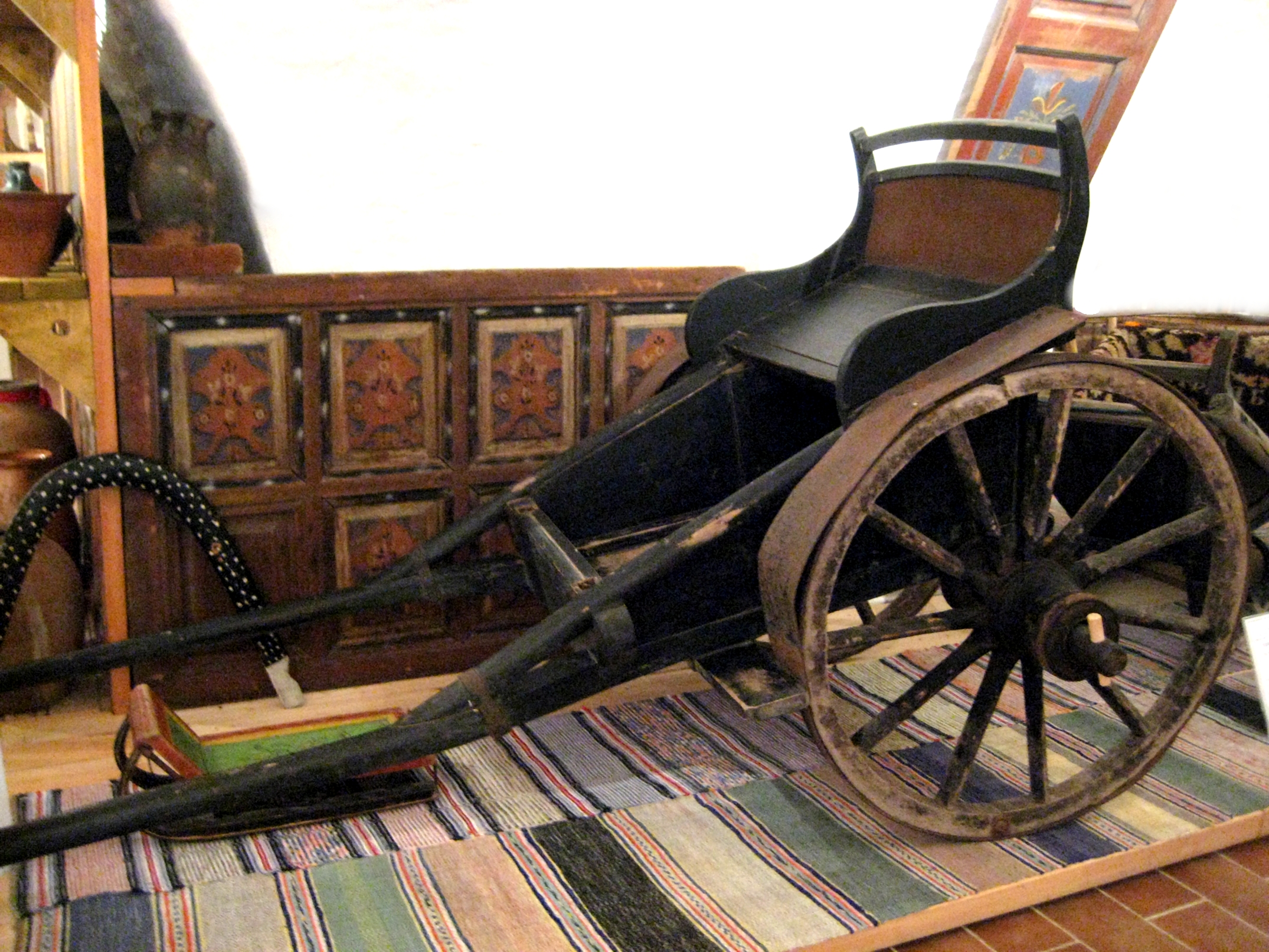 Двуколка. Конец 19 века. Из собрания Михаила Васильевича Сурова. Музей крестьянского быта, Ферапонтов монастырь